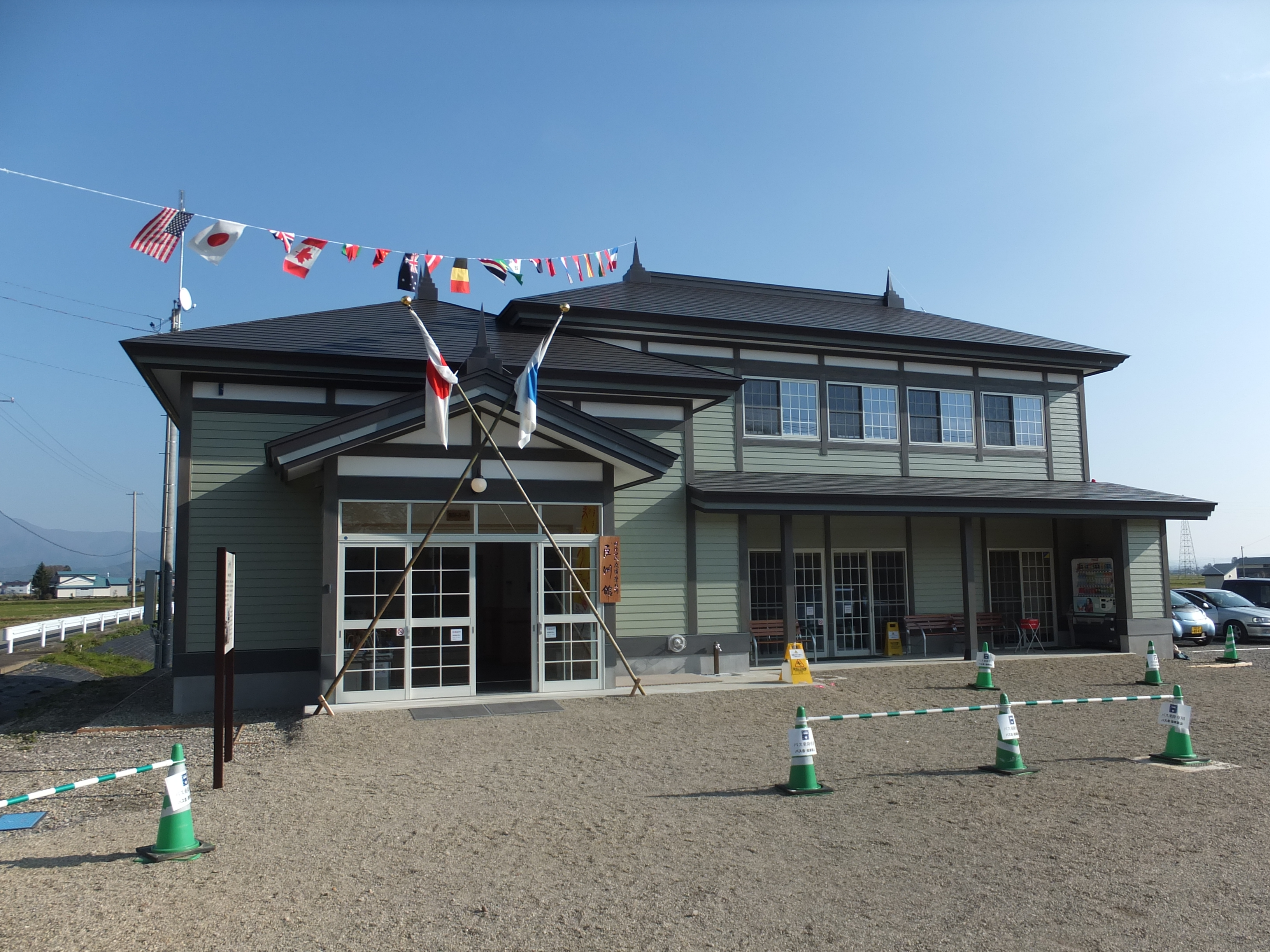 秋田県大仙市、旧池田氏庭園観光案内所「巨洲館」（おおしまかん）。正門前の駐車場に2013年10月にオープンした。